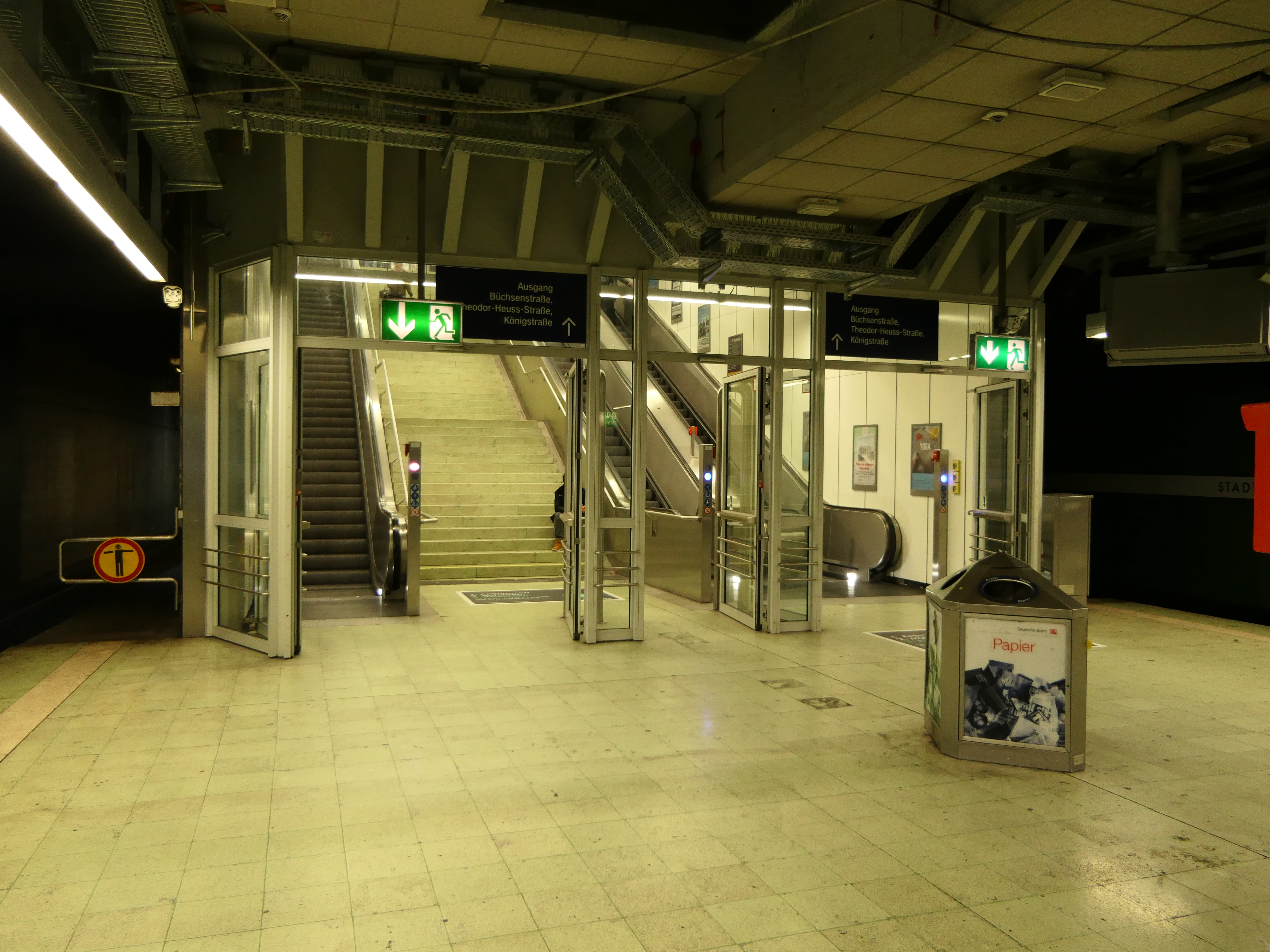 Brandschutztüren an der Treppenanlage am Bahnsteig im unterirdischen S-Bahnhof Stadtmitte in Stuttgart.